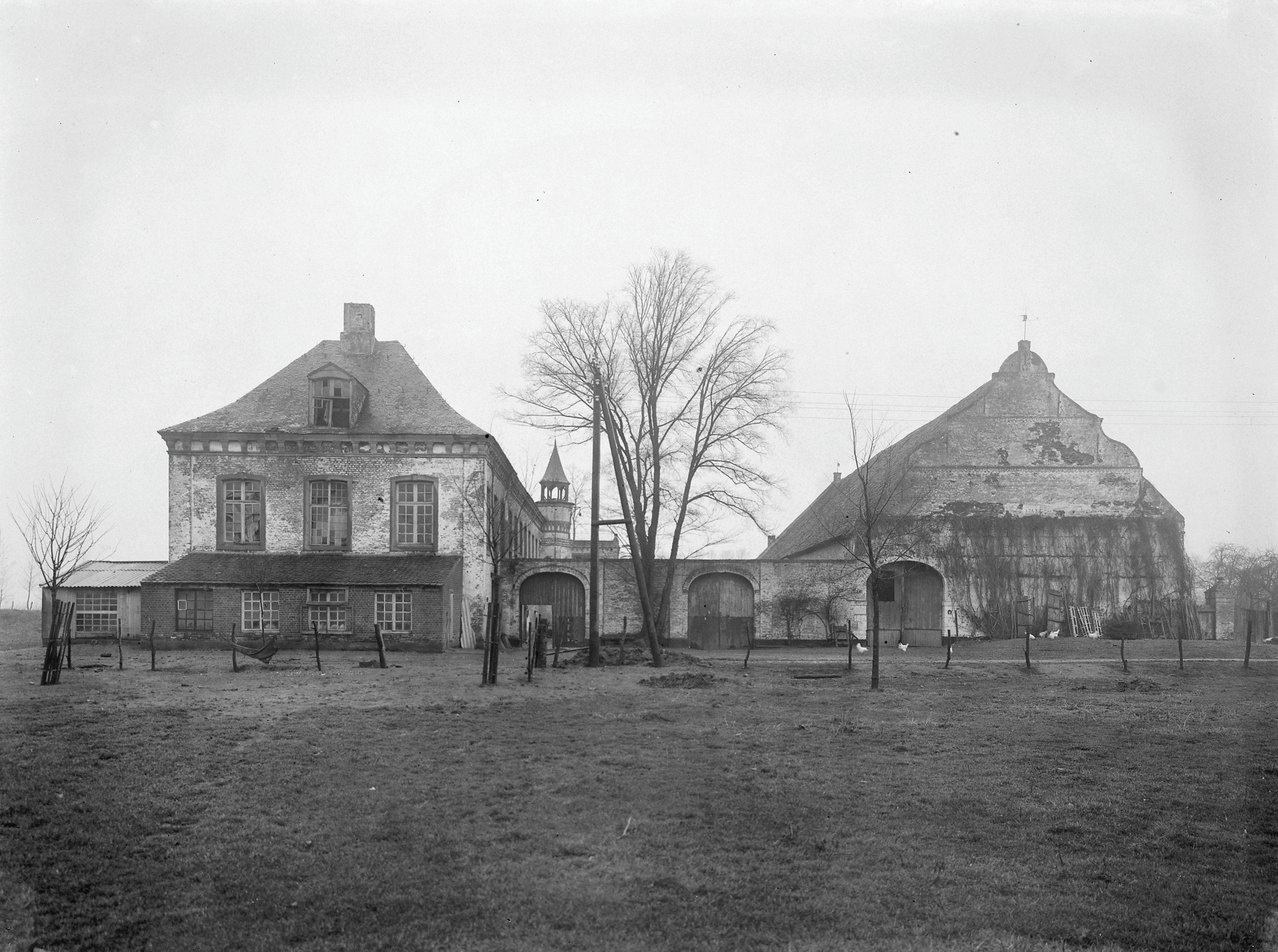 Kasteel Walborch: Overzicht achtergevels kasteel en hoeve